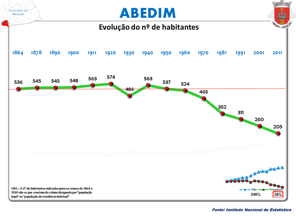 Censos 1864/2011